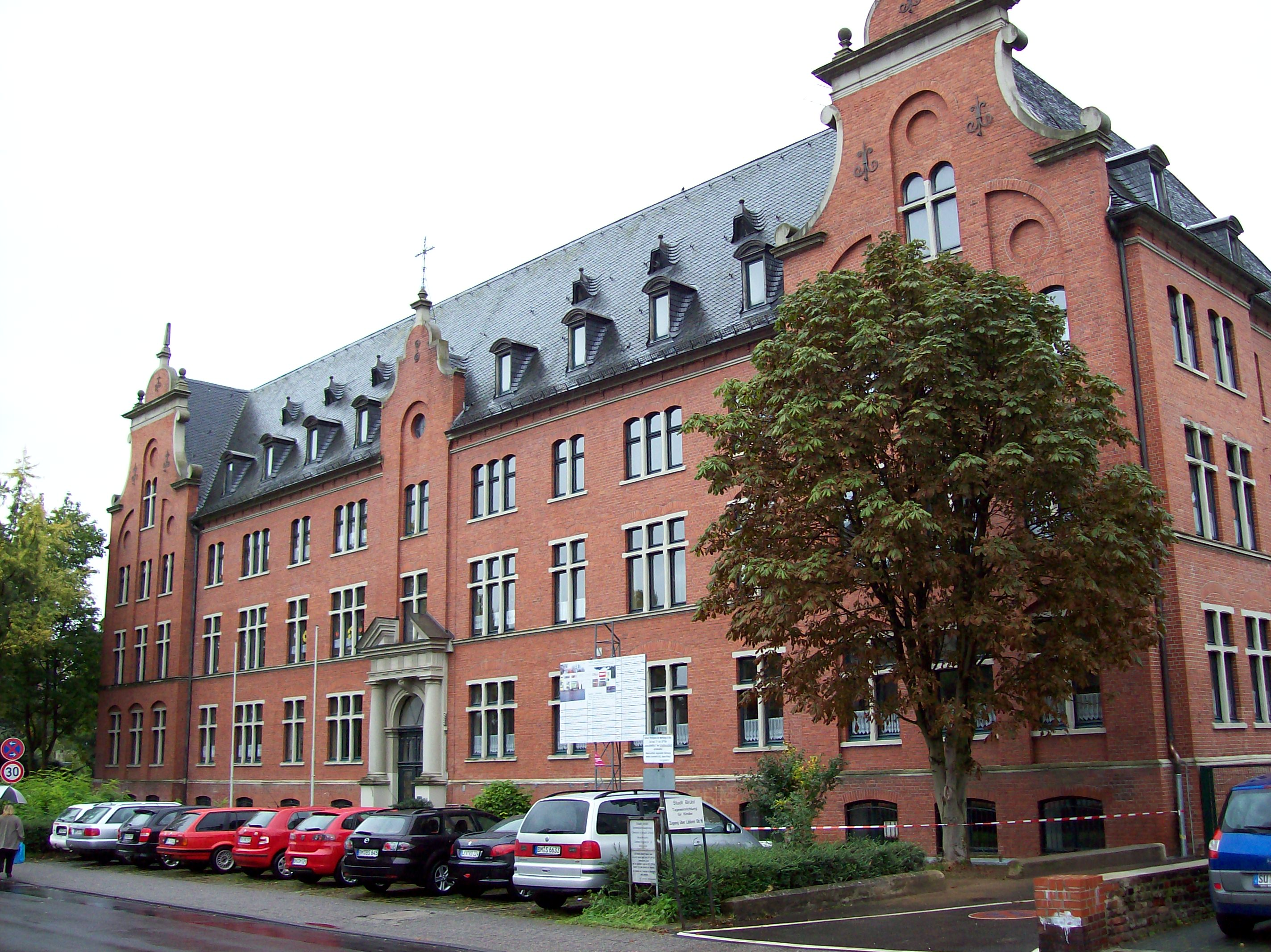 Clemens-August-Schule in Brühl (Germany)